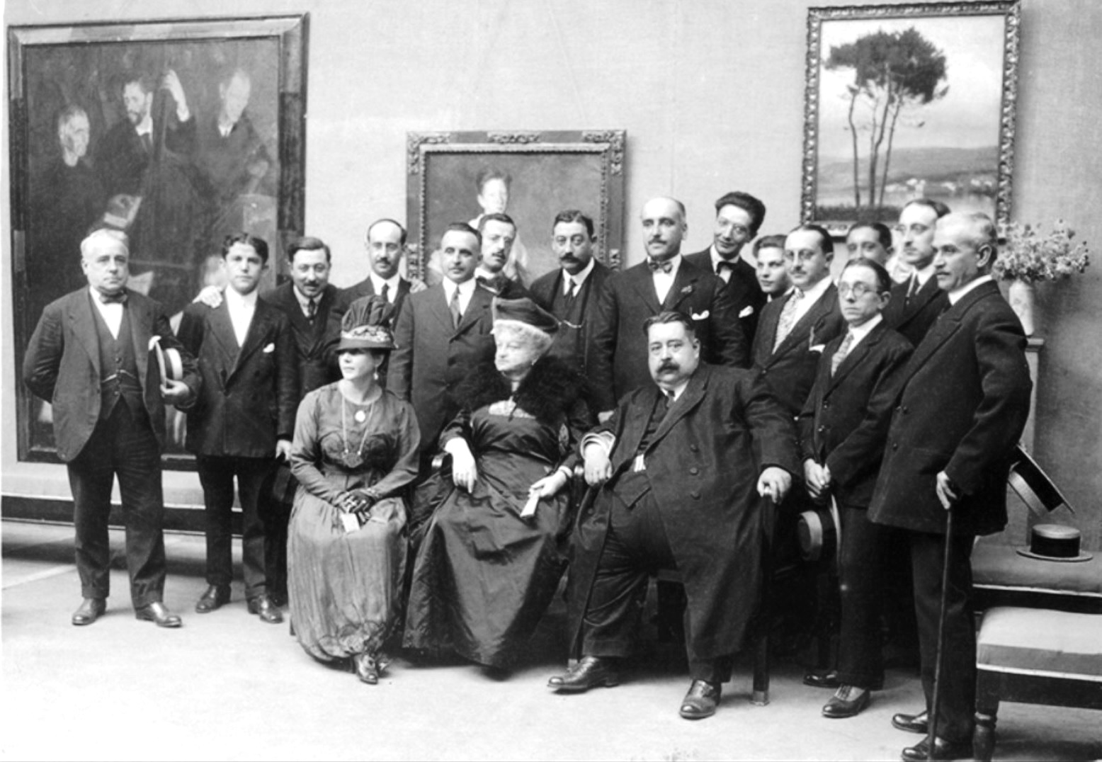 Pié de foto en Nuevo Mundo:"Presidencia y algunos de los concurrentes al banquete con que fué obsequiado por los artistas y escritores gallegos nuestro compañero José Francés, el día de la inauguración de la Exposición de Arte regional de la Coruña. En el grupo figuran la condesa de Pardo Bazán, señora de Francés, alcalde de la Coruña Sr. Puga y Parga y los artistas Sotomayor, Palacios, Lloréns, Castelao, Sobrino, Abelenda, Madariaga, Seijo Rubio, González Villar, Tella, Santamarina, Cocheiro, etc."